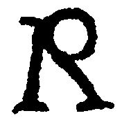 Reproduction du "R-bizarre" de Adolf Rusch